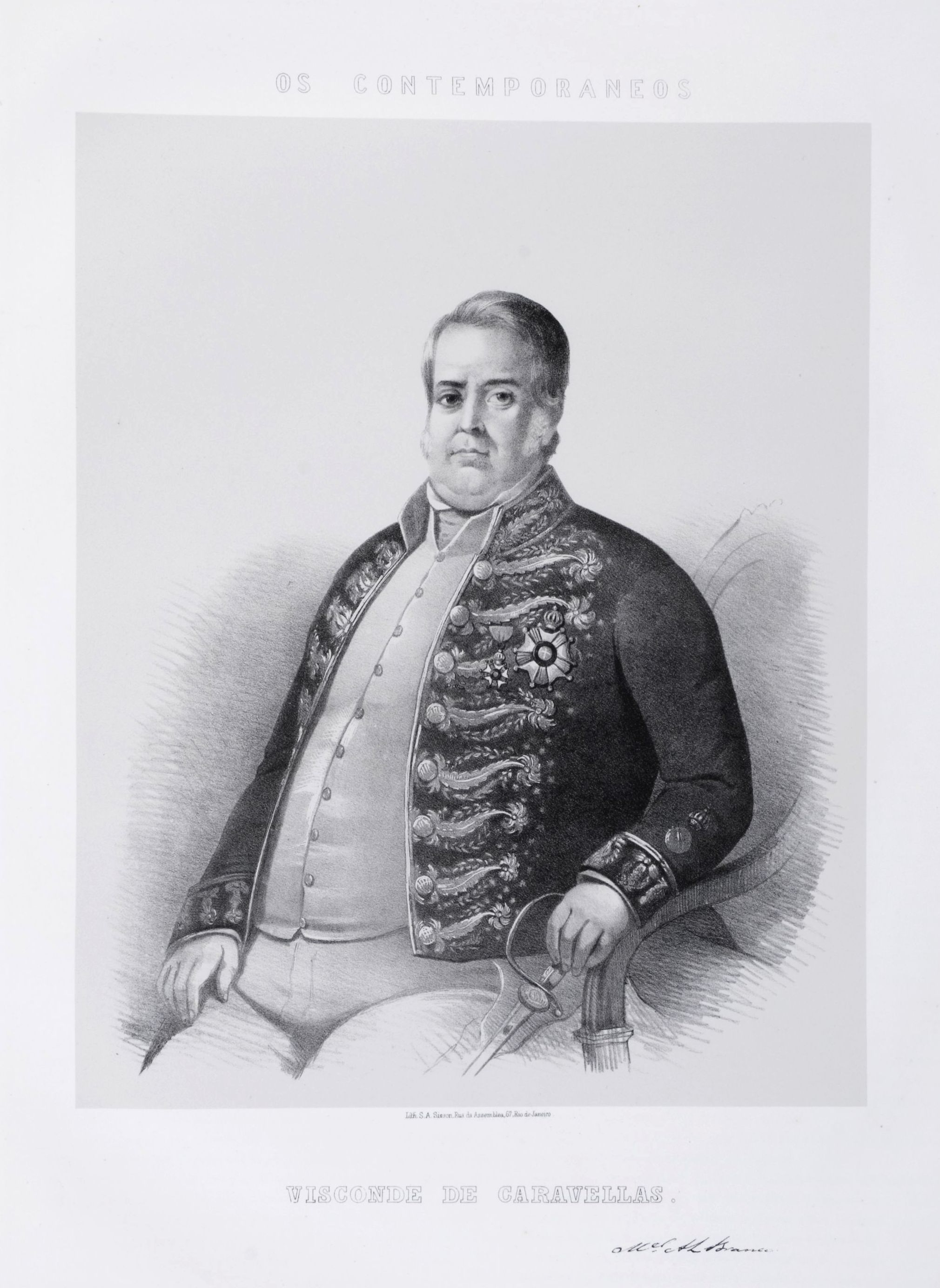 Litografia em preto e branco